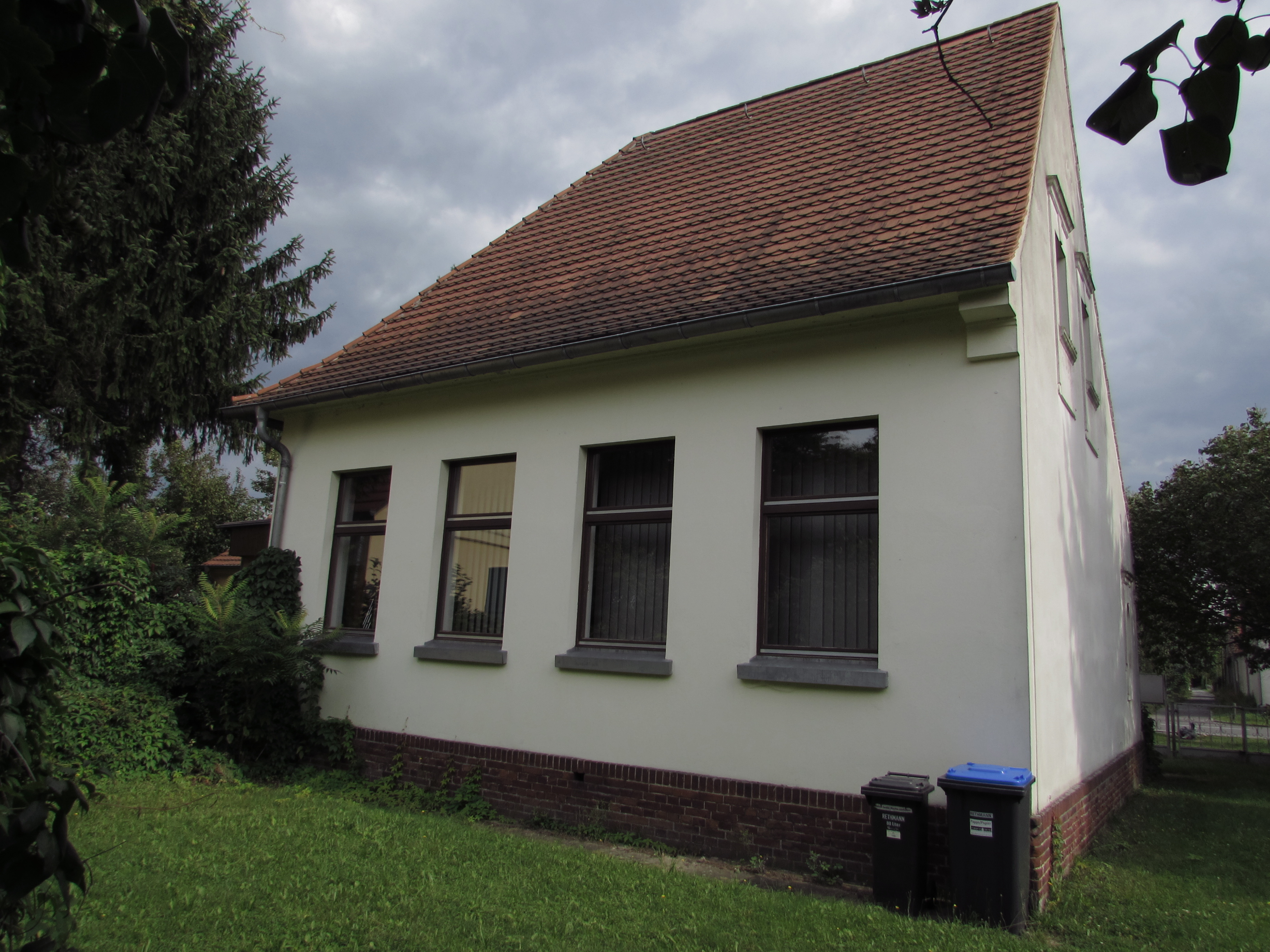 nordseit bet- und schulhaus wilhelmsdorf